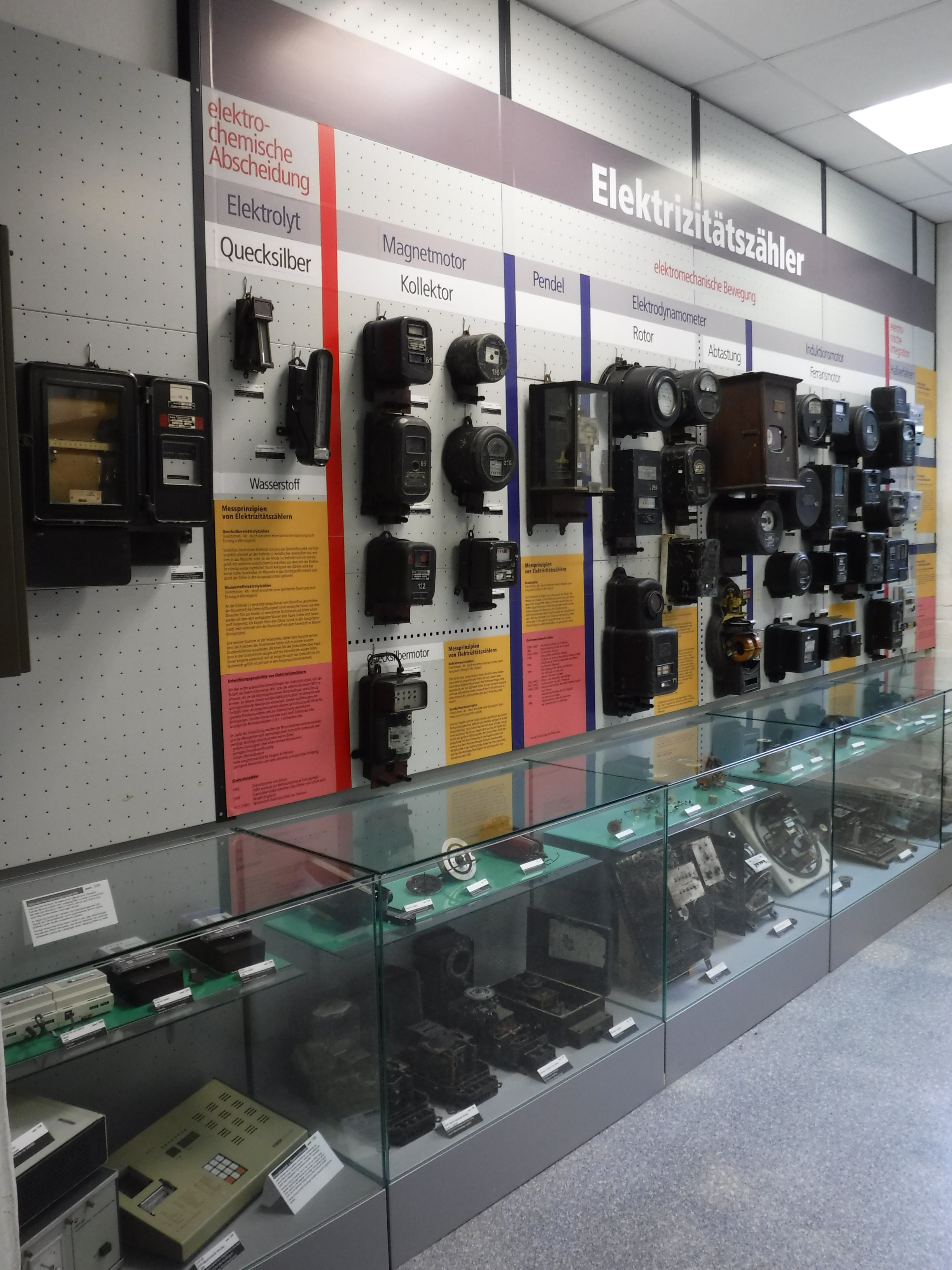 Elektrizitätszähler im "Strom"-Bereich des Dresdner Energiemuseums